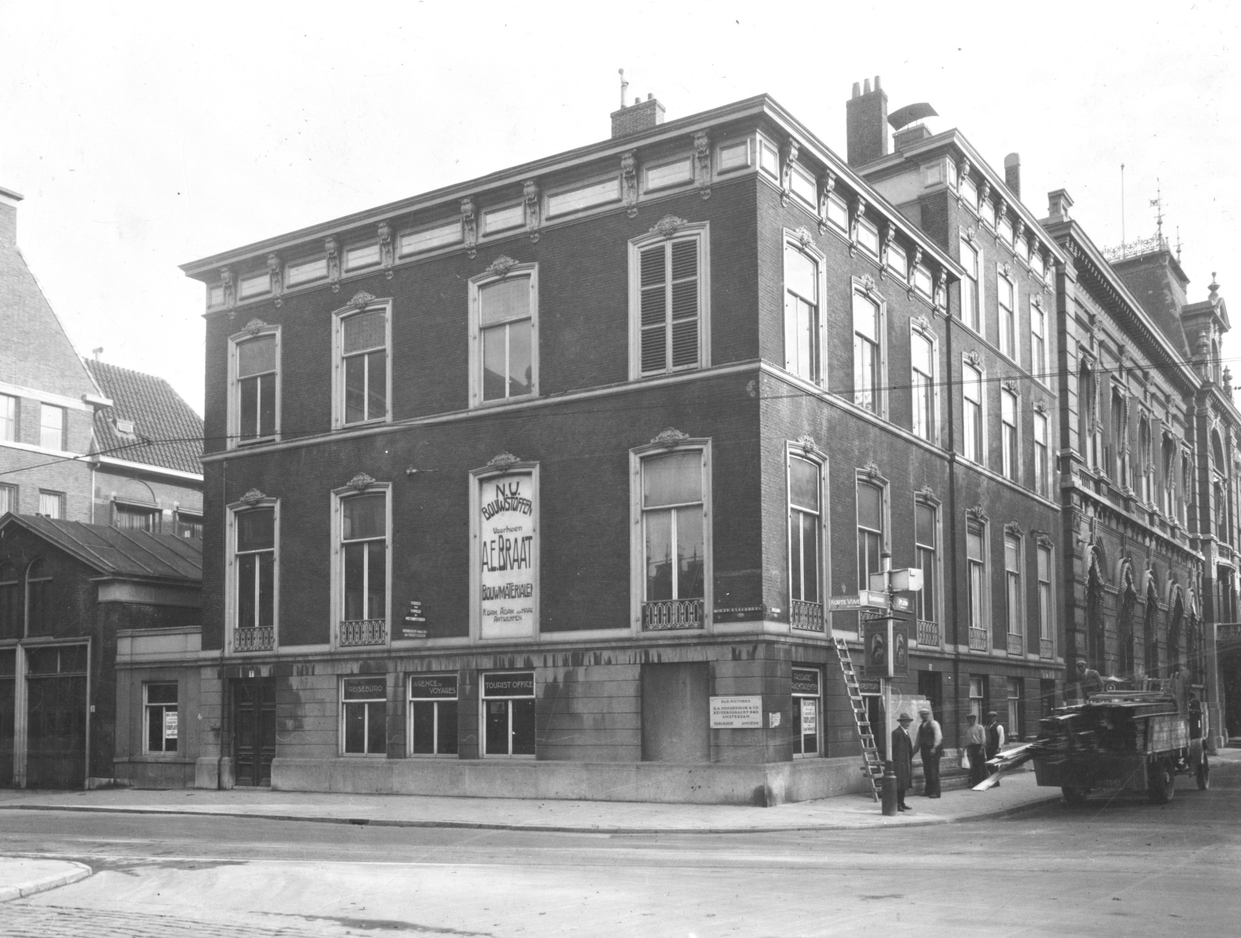 Plein, hoek Korte Vijverberg met rechts Sociëteit De Witte